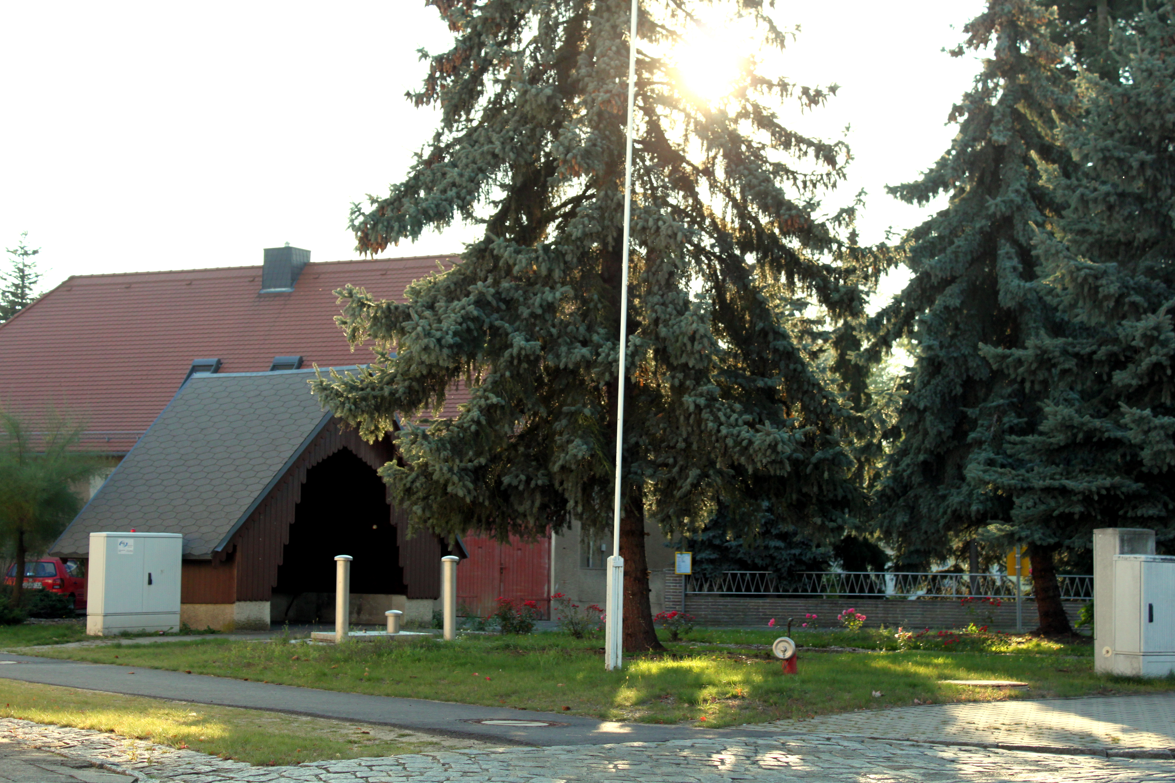 Haida